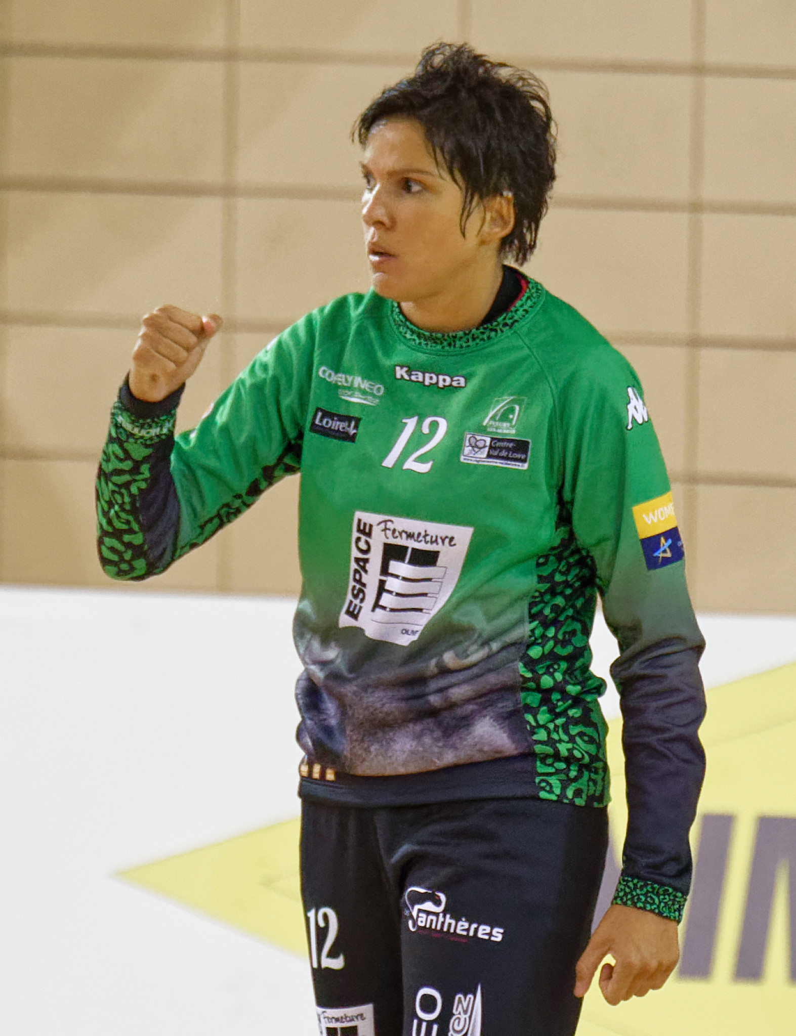 Rencontre de championnat entre Issy Paris Hand et fleury. A Issy Les Moulineaux, le 22 septembre 2015